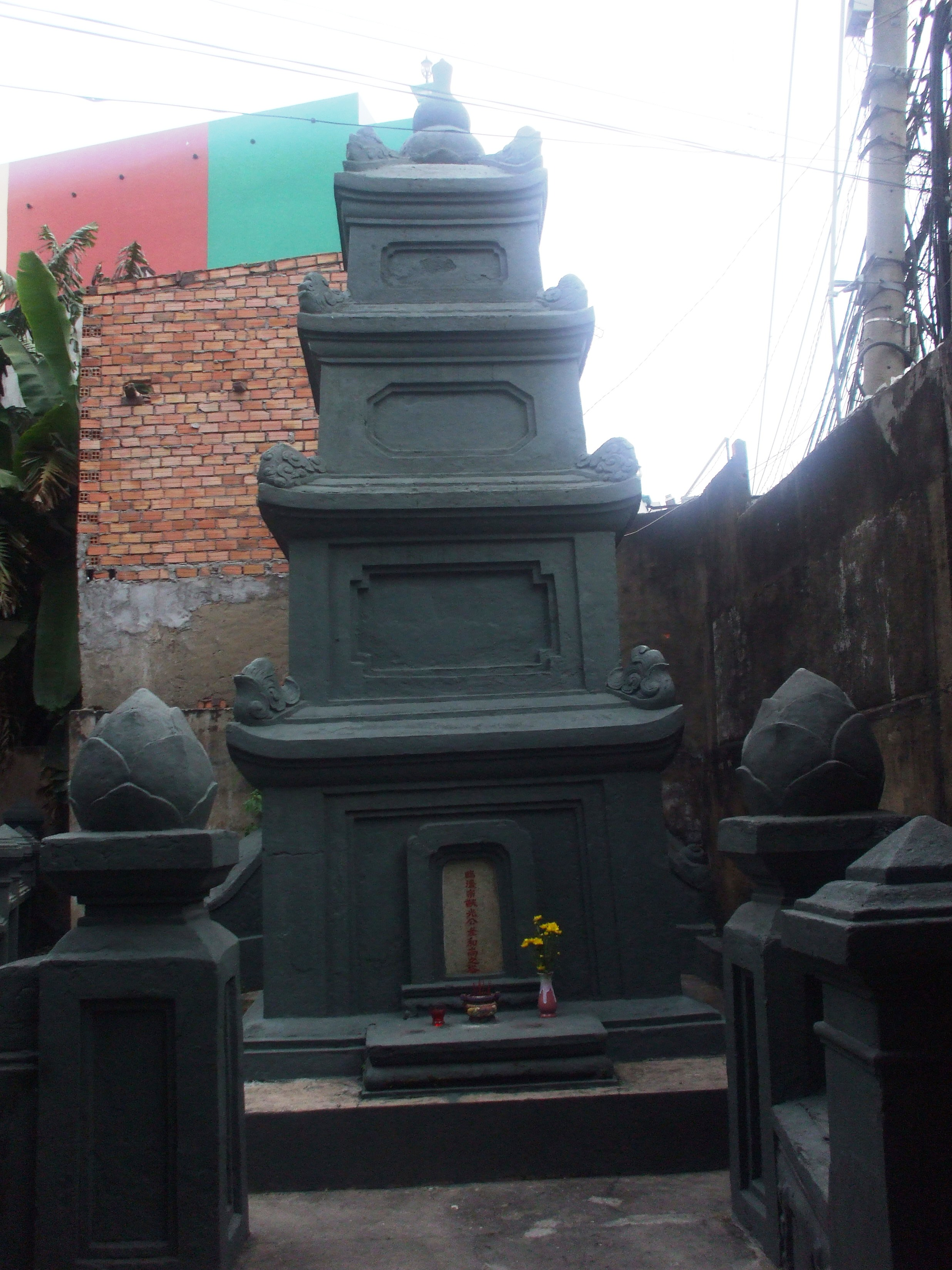 Tháp chứa di cốt Thiền sư Tổ Tông-Viên Quang trong khuôn viên chùa Giác Lâm (quận Tân Bình, Tp. Hồ Chí Minh, Việt Nam).